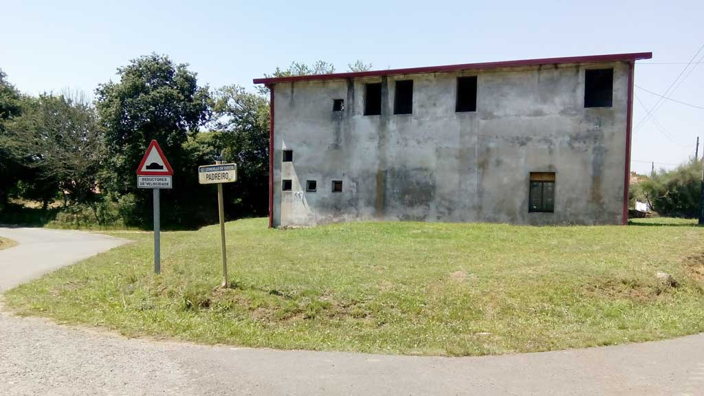 Vista de Padreiro, Curtis.